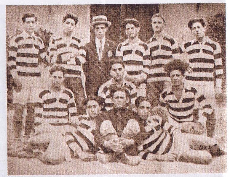 Formazione Sporting Club Audax